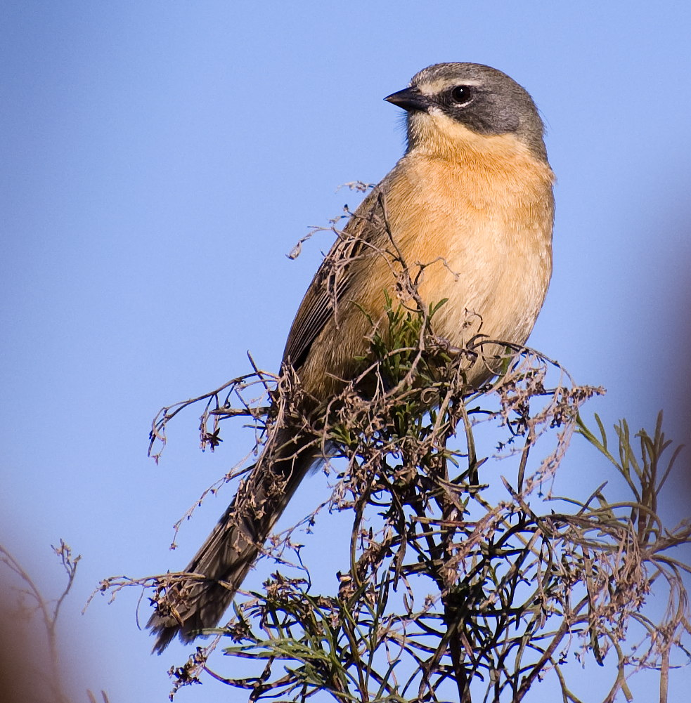 MONTERITA CABEZA GRIS Donacospiza albifrons Fotografia tomada en Canelones - Uruguay